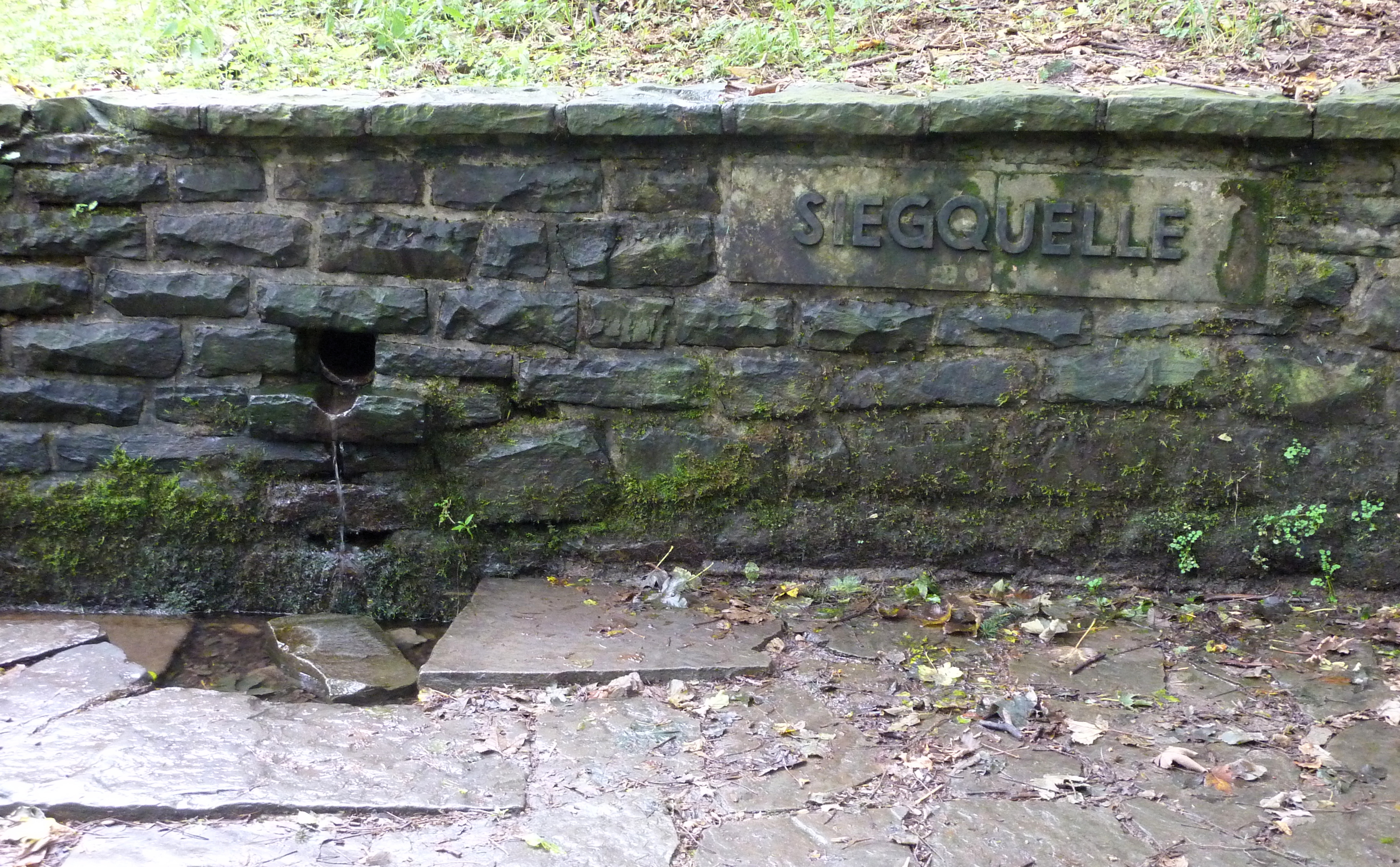 Im Rothaargebirge bei Walpersdorf (Netphen)/Westfalen: Die Quelle der Sieg entspringt am Berg Jägerhain, etwa 3 km nordöstlich des Ortes.